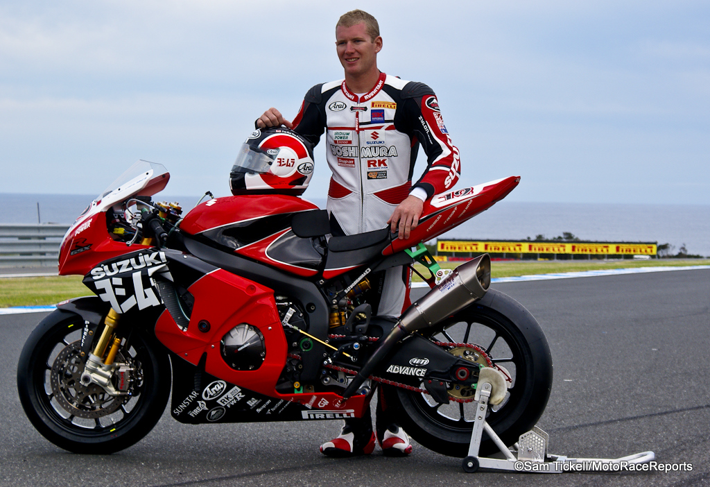 Joshua Waters e la GSX-R1000 del team Yoshimura Suzuki Racing